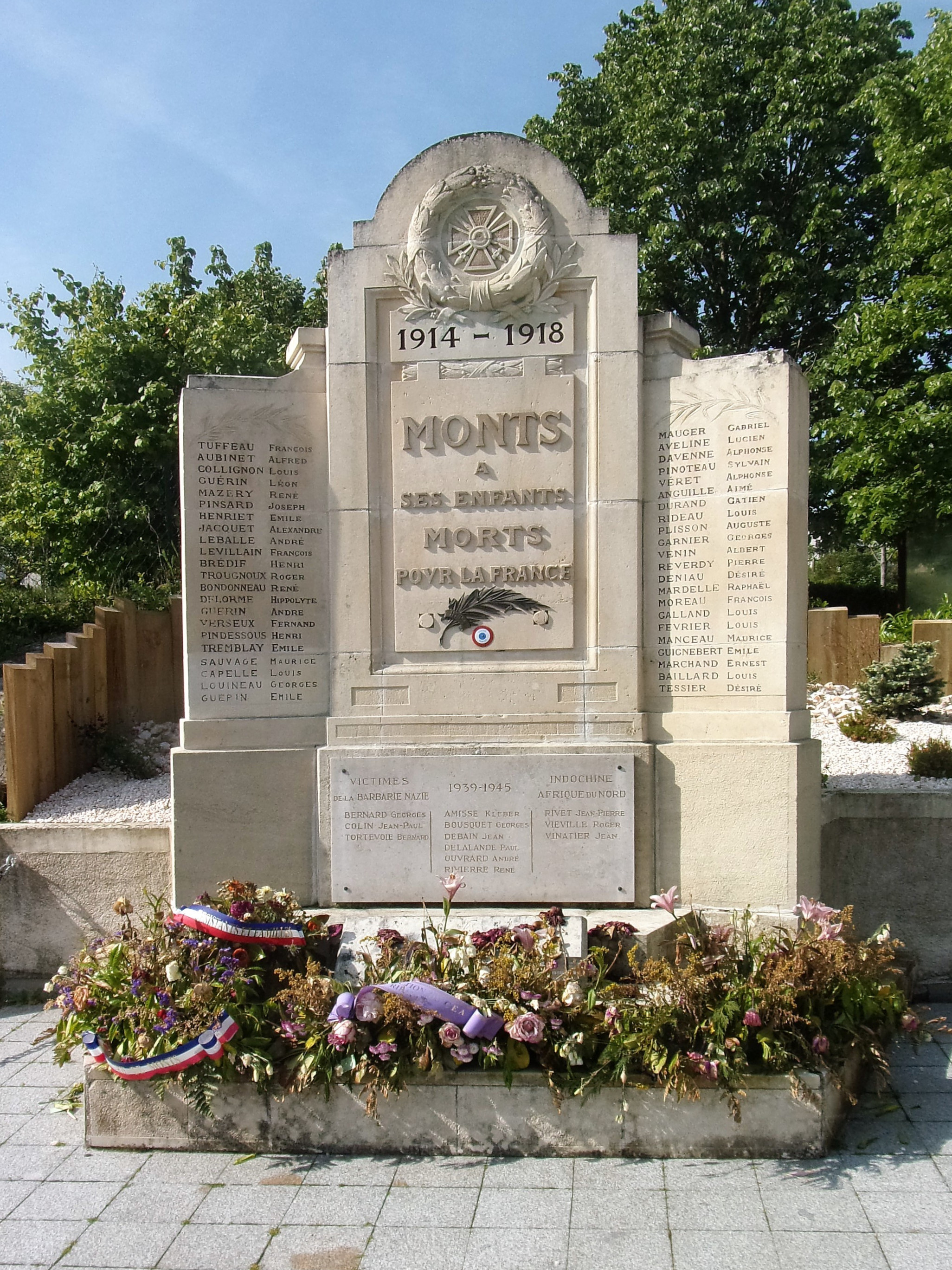 Monument aux morts (Monts, 37) rue Georges-Bernard. Coordonnées : 47.277031, 0.623442